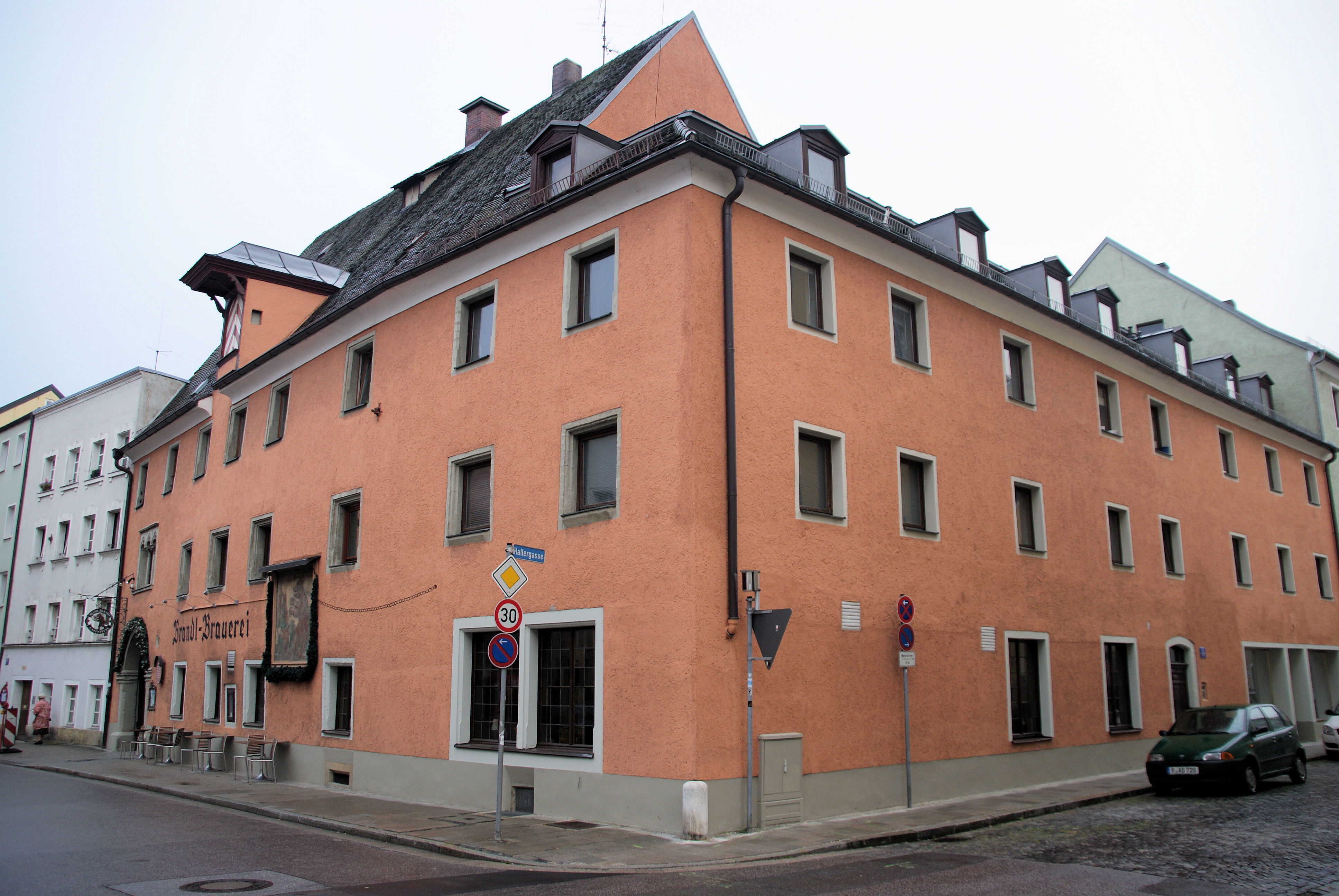 Wohn- und Gasthaus "Zum Bär an der Kette", dreigeschossiges und traufständiges Haupthaus mit Walmdach und Aufzugsgaube, frühgotisch, 2. Hälfte 13. Jh., Umbauten 1596 und 1777; Westflügel, zweiteilig, nördlich dreigeschossiger Walmdachbau, im Kern 15. Jh., Umbauten 1874; Gaststuben mit Ausstattung; ehem. Sommerschenke, erdgeschossiger Garteneinbau mit Satteldach und östlich angebauter Kegelbahn, frühes 19. Jh.; Gartenmauer an der Heiliggeistgasse, wohl barock, mit Erhöhung im 19. Jh.